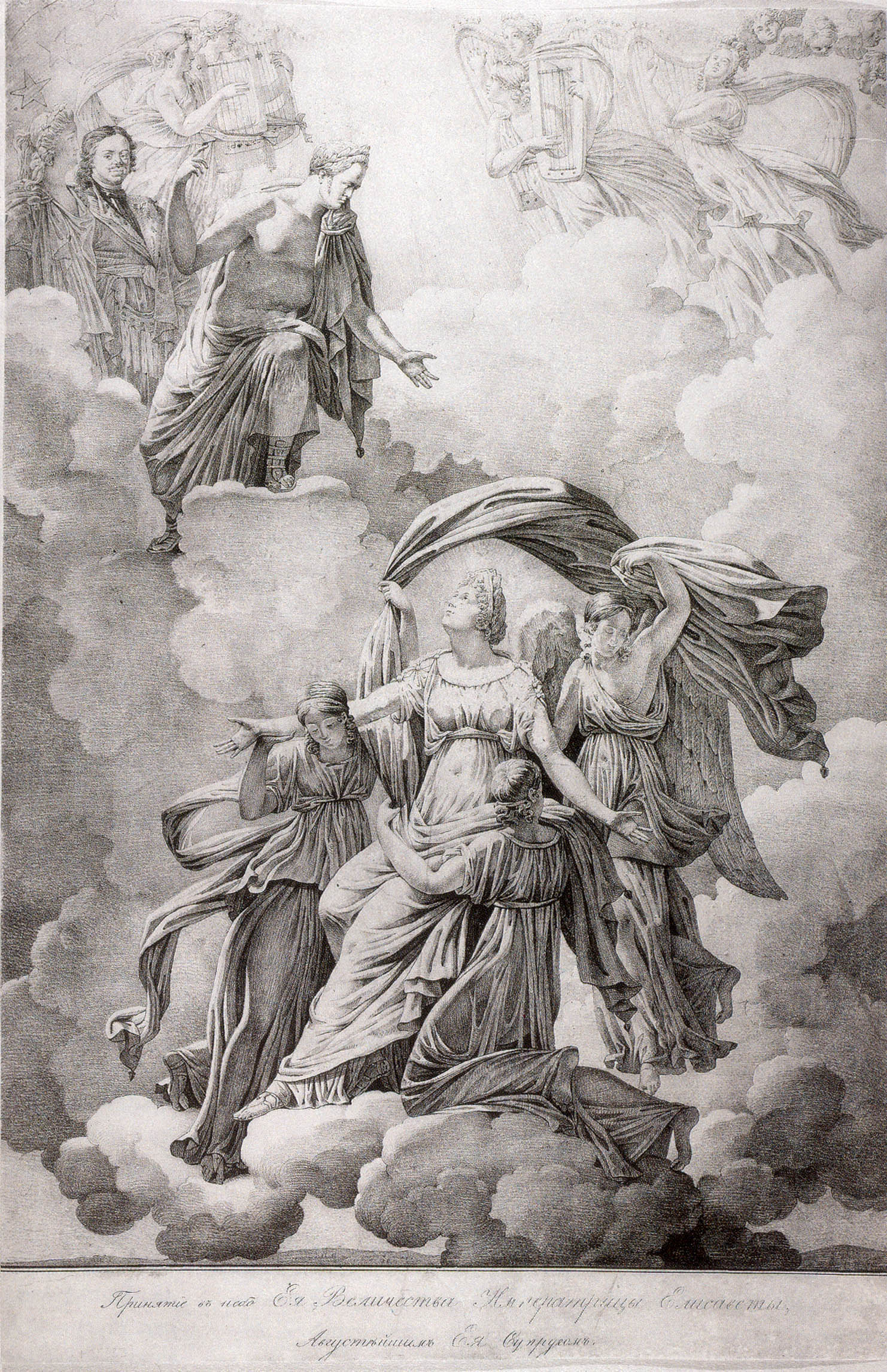 Неизвестный гравер Аллегория на смерть императрицы Елизаветы Алексеевны Россия, 1826 г. Эрмитаж бумага, литография 22,3х36 см ЭРГ-6693